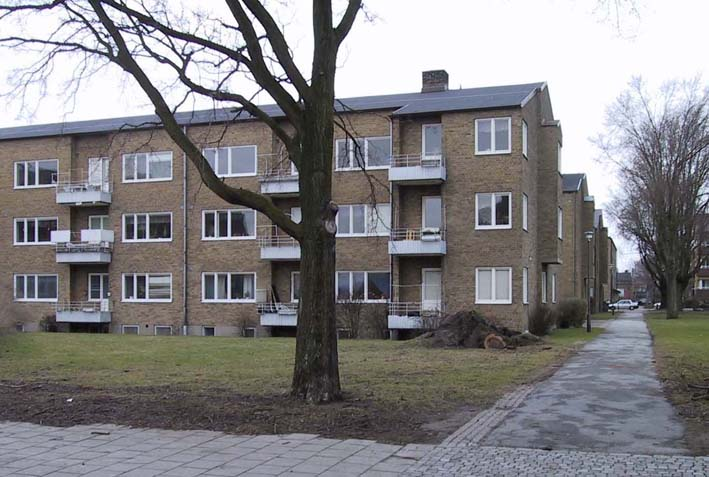 Bostadshus i stadsdelen Kirseberg i Malmö, ritat av arkitekten Fritz Jaenecke på 1940-talet.